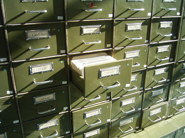 card catalouge